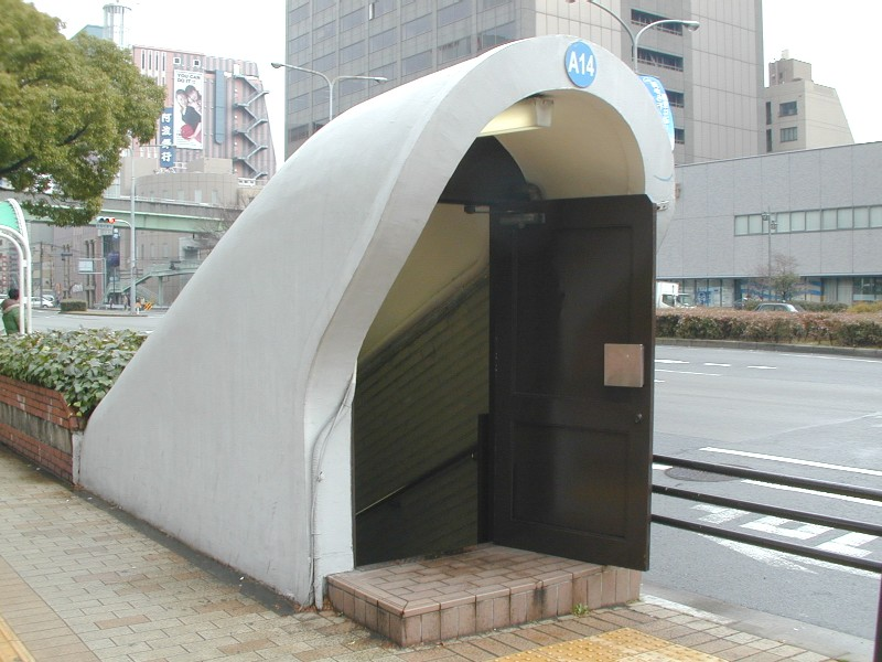 地下街入口